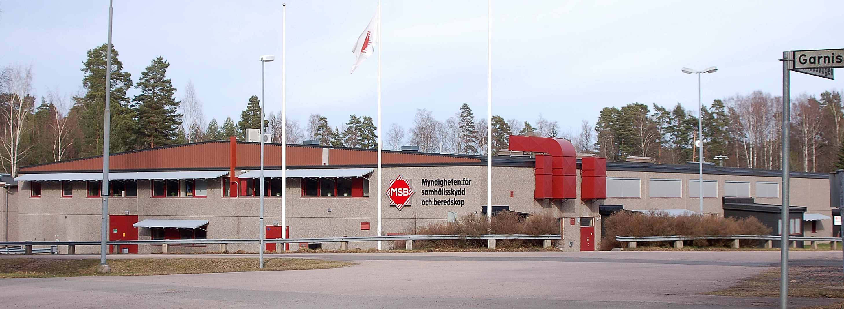 Förråd och kontor för Myndigheten för samhällsskydd och beredskap i Kristinehamn.